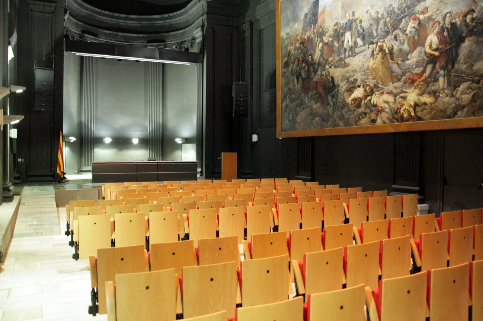 Exposició Anatomia d'un quadre, al voltant de l'obra El Gran dia de Girona al Museu d'Art de Girona